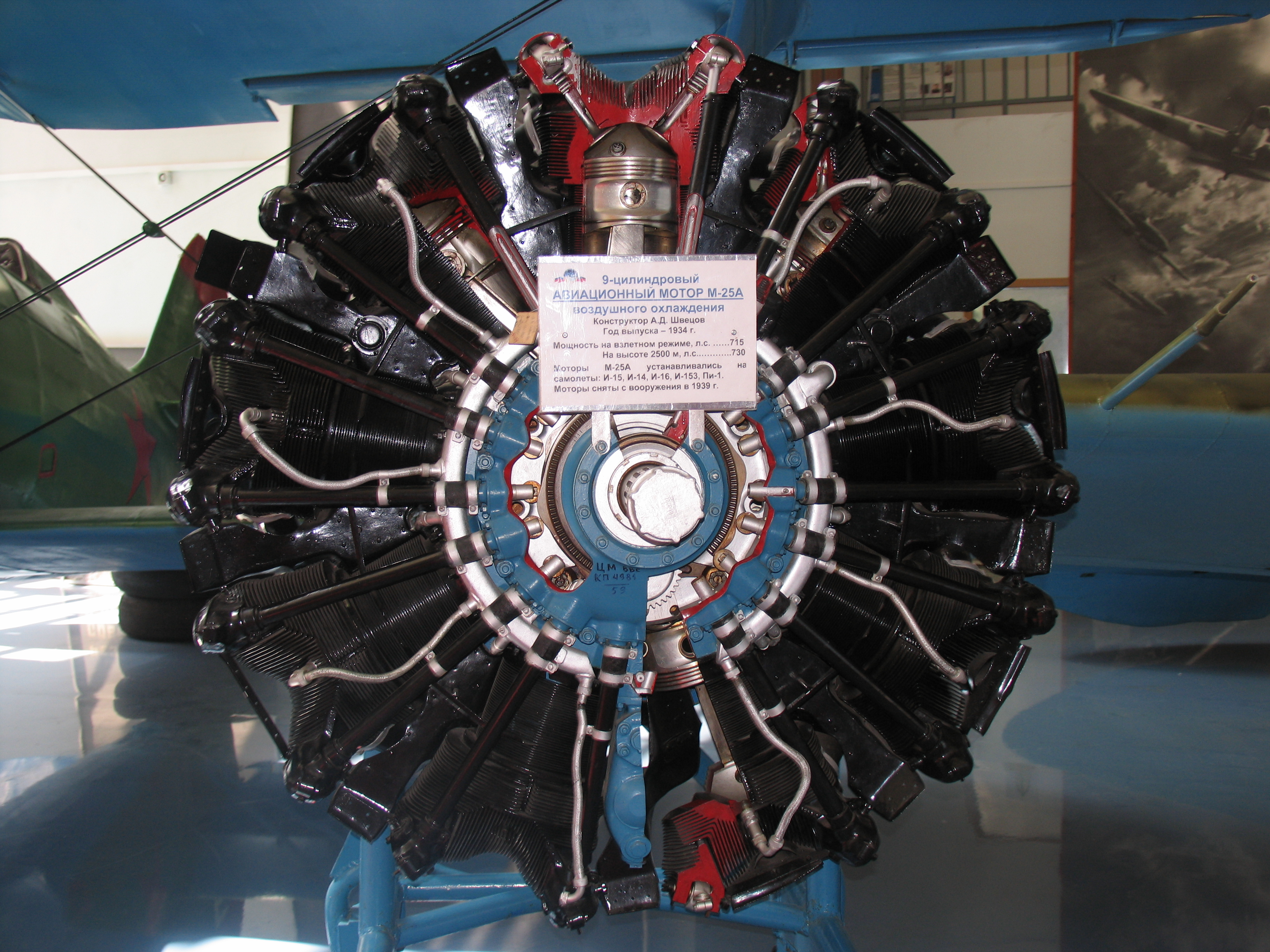 Двигатель М-25А. Музей ВВС.